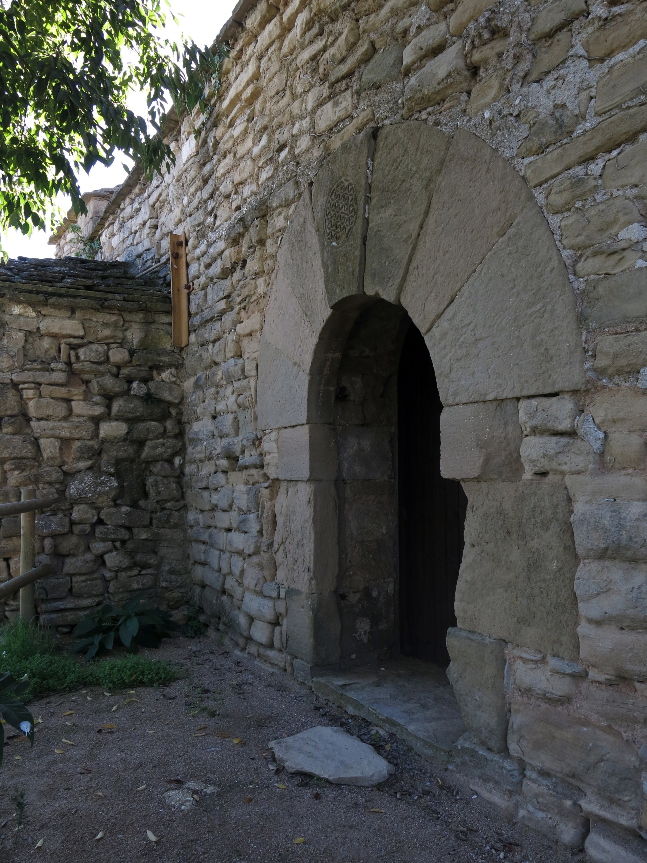 Sant Urbà de Montsonís